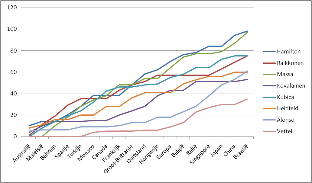 Formula 1 standings op top 8 drivers.